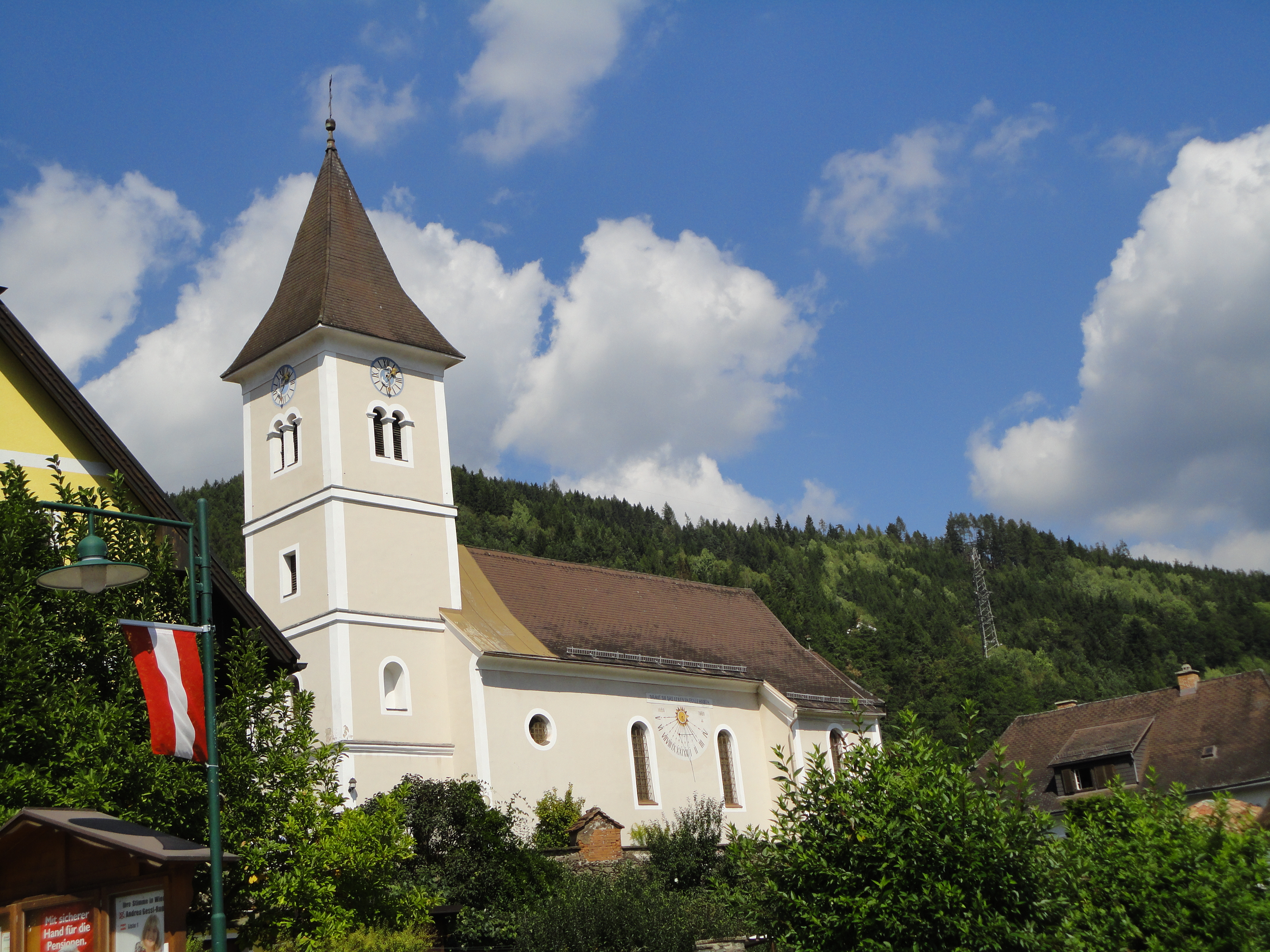 Kath. Pfarrkirche hl. Martin und Friedhof mit Ummauerung und Portal